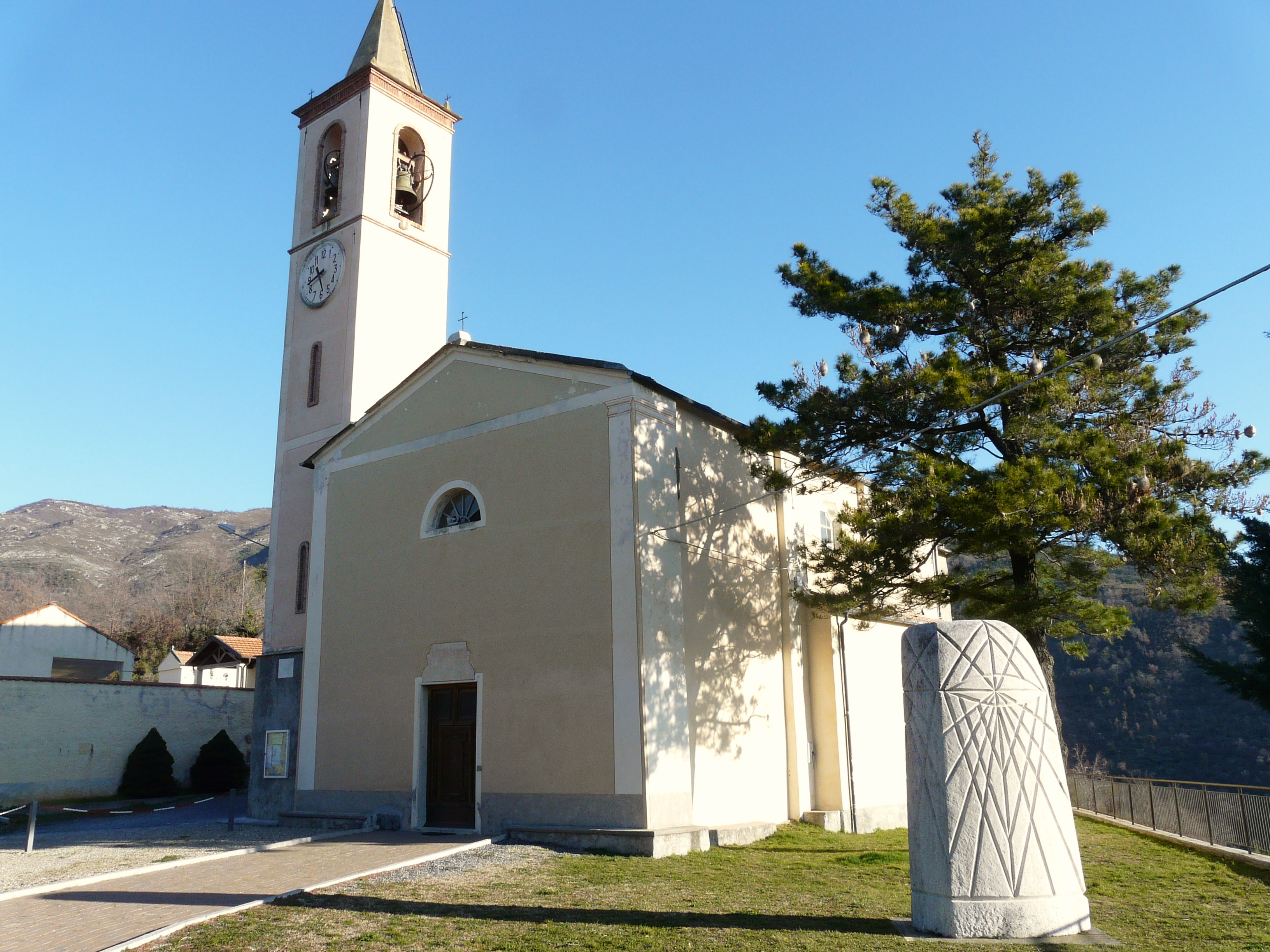 Chiesa di Sant'Antonino, Vendone, Liguria, Italia